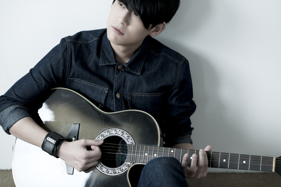 陳乃榮《同種異類》專輯